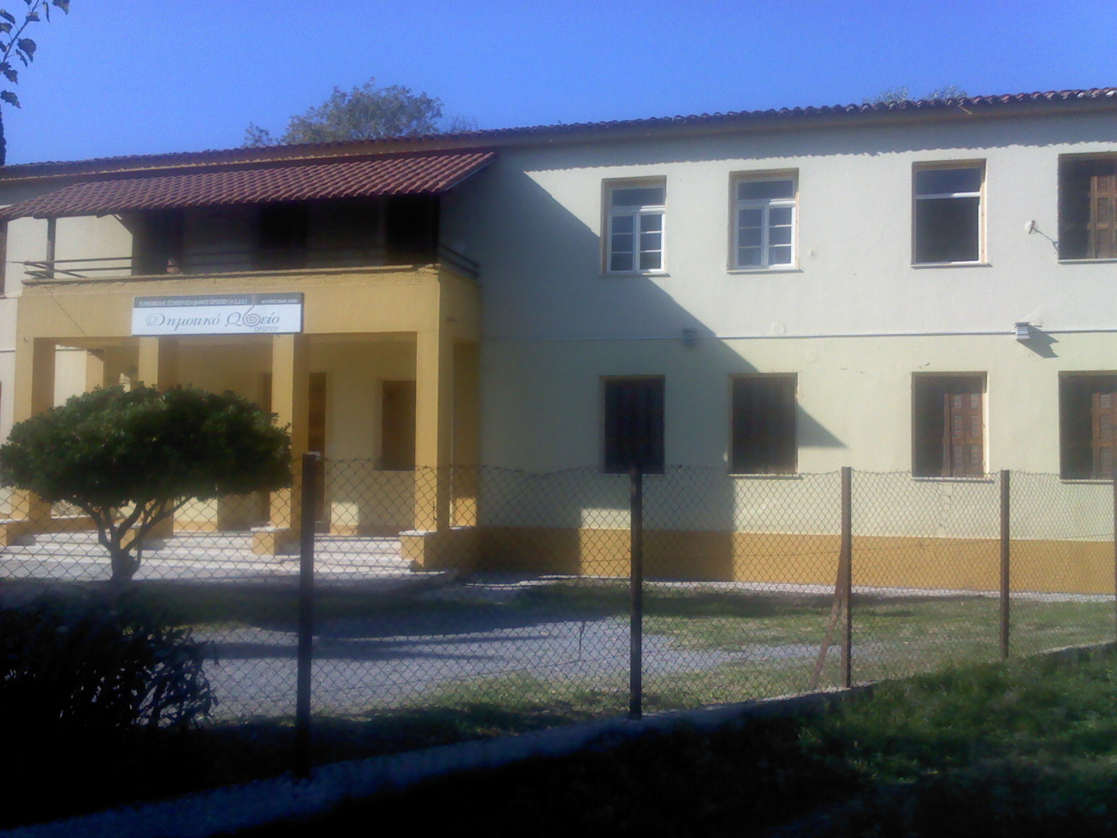 Δημοτικό Ωδείο Ωρωπού στην θέση των παλιών φυλακών Σκάλας